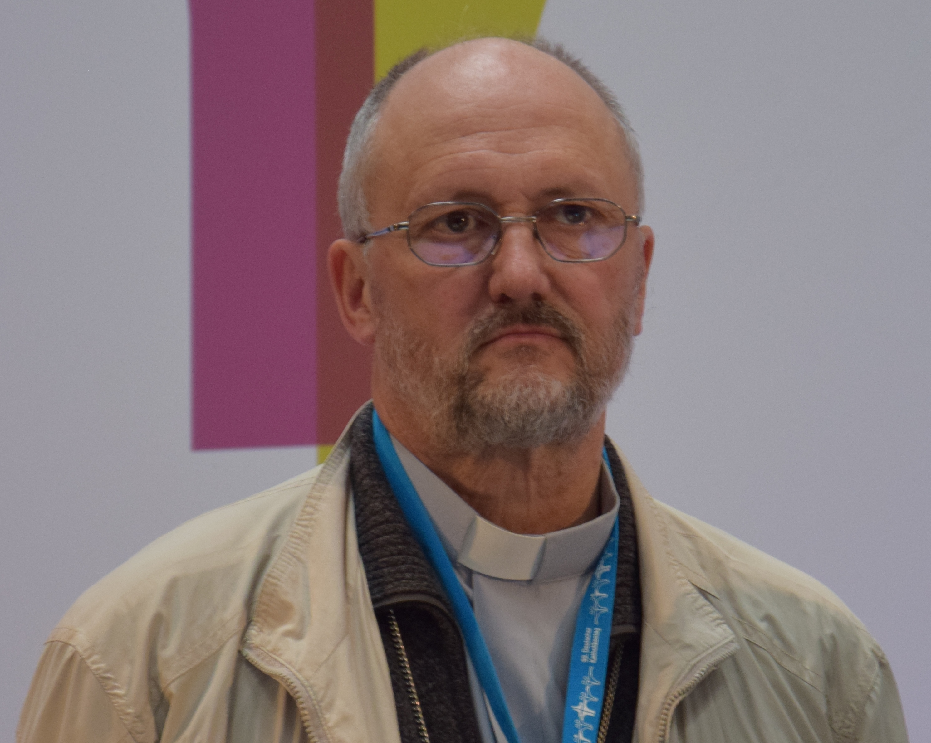 99. Deutscher Katholikentag in Regensburg